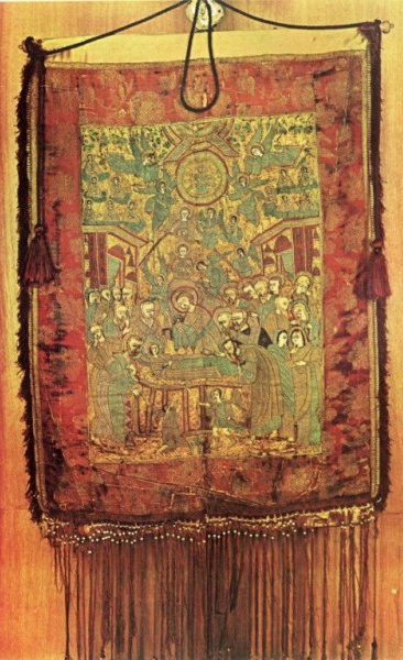 Το χρυσοκέντητο Λάβαρο της Αγίας Λαύρας